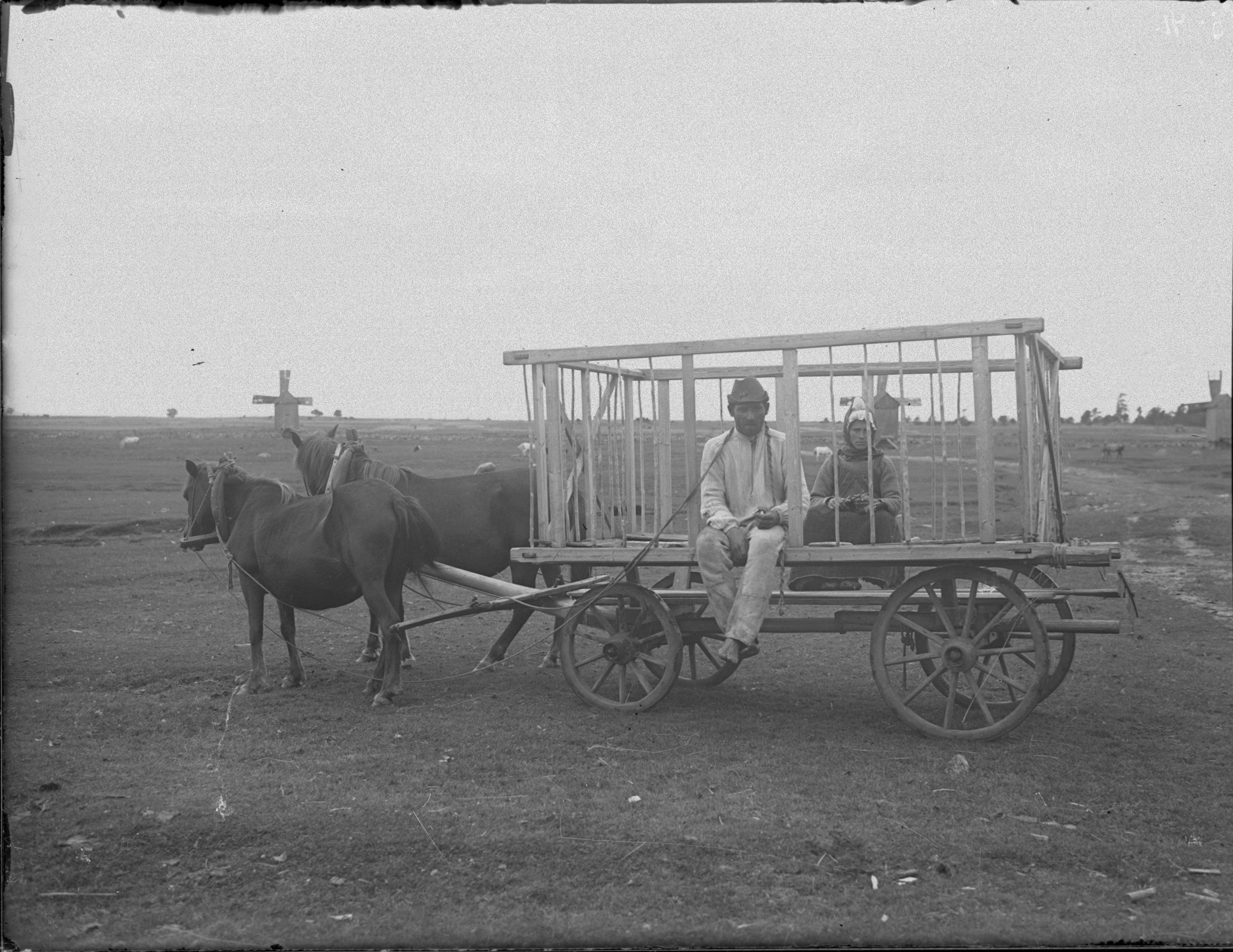 Poykarpos - viljaveo vanker, Ruhnu